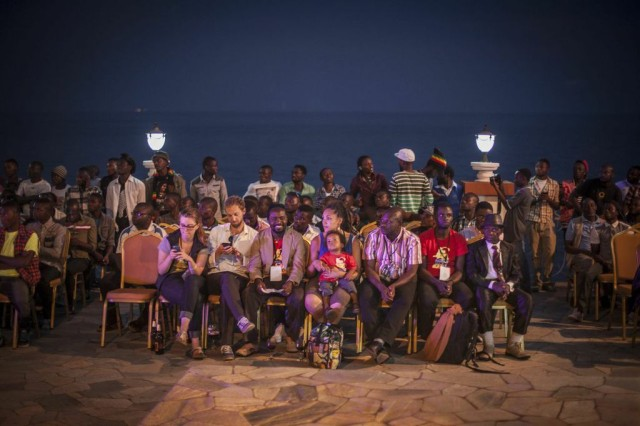 Fowk at the Salaam Kivu International Film Festival